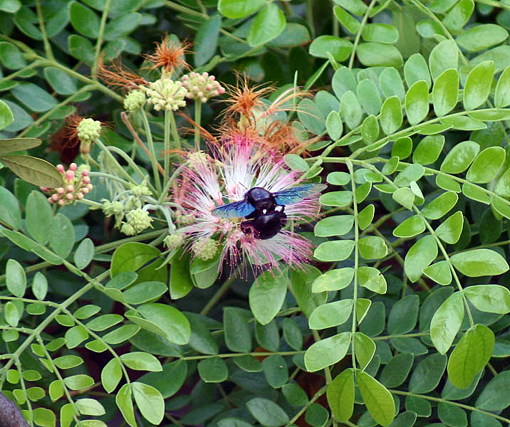 Vilaiti Siris Albizia saman (= Samanea saman) in Kolkata, West Bengal, India.